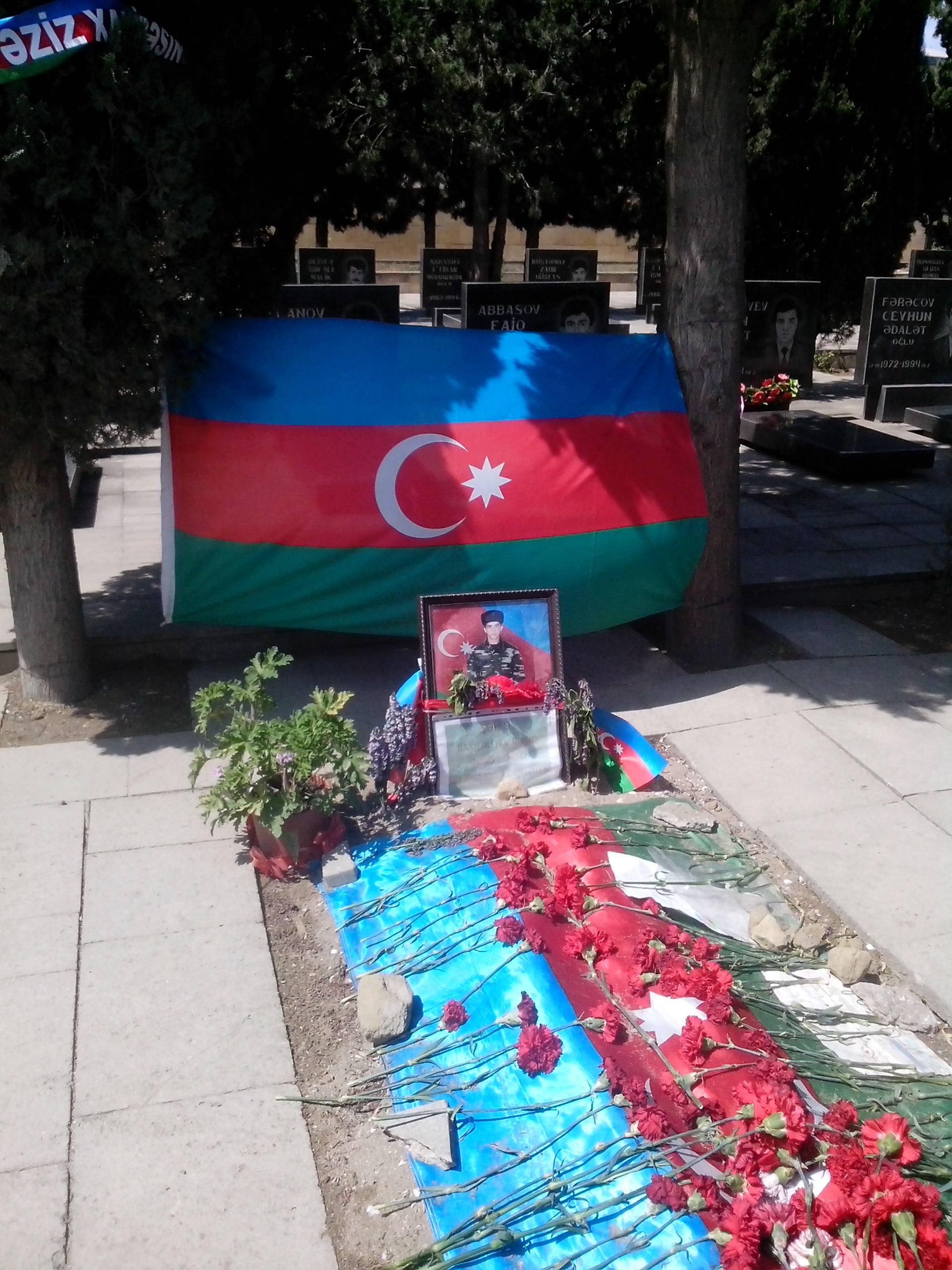 Sumqayıt Şəhidlər Xiyabanında dəfn olunan şəhid Rəşid Baxışəliyev